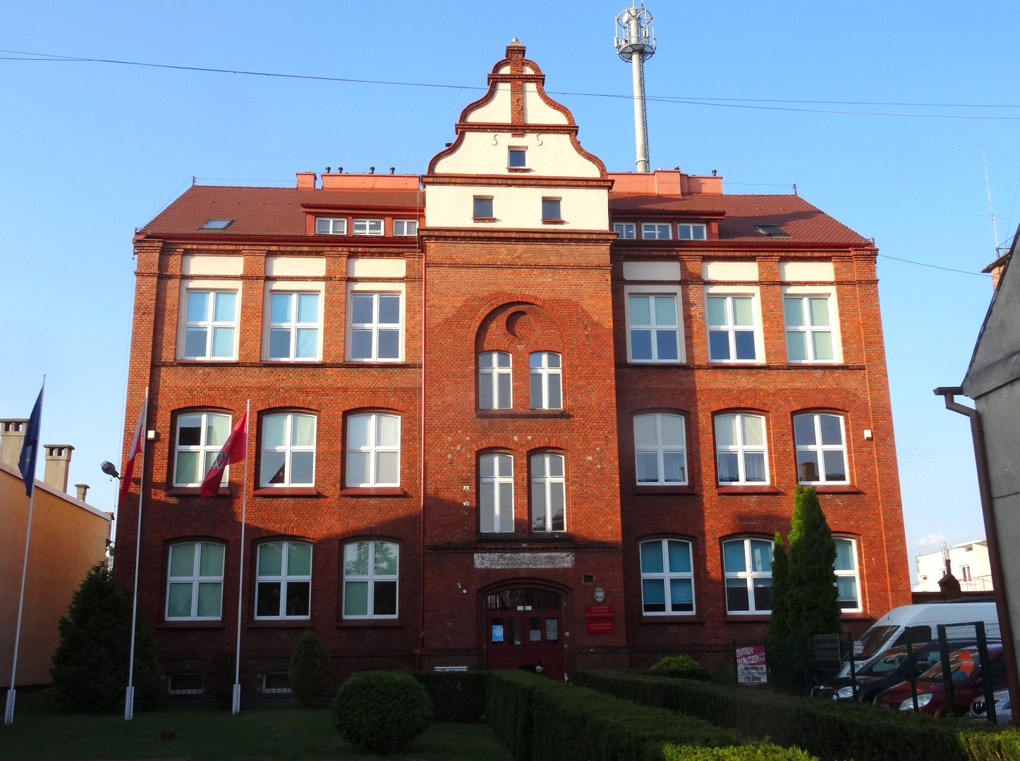 Budynek Starostwa Powiatowego w Nakle nad Notecią. Wzniesiony w latach 1893-1894 dla polskiej szkoły katolickiej.